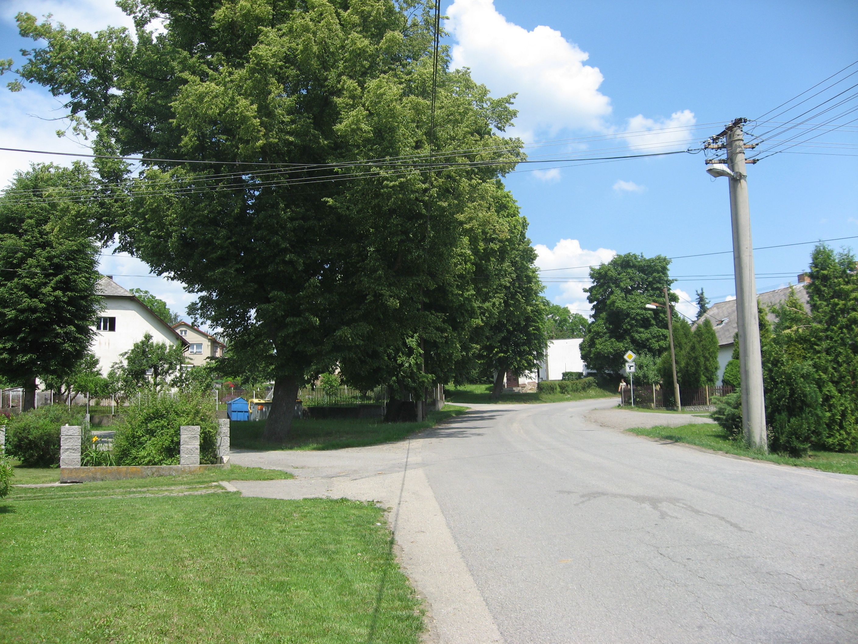 Kochánov